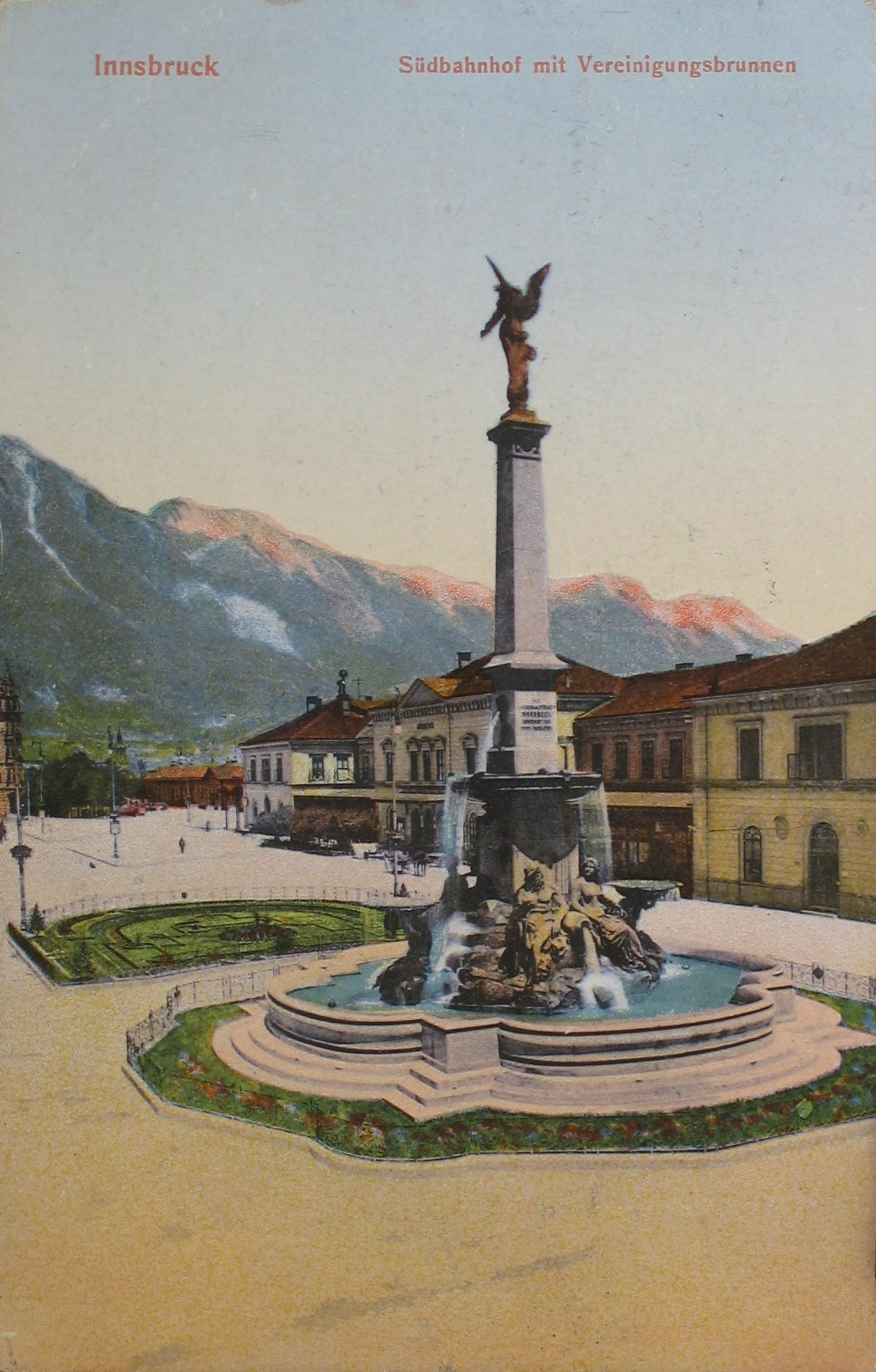 Innsbruck, Südbahnhof (heute: Hauptbahnhof) mit Vereinigungsbrunnen